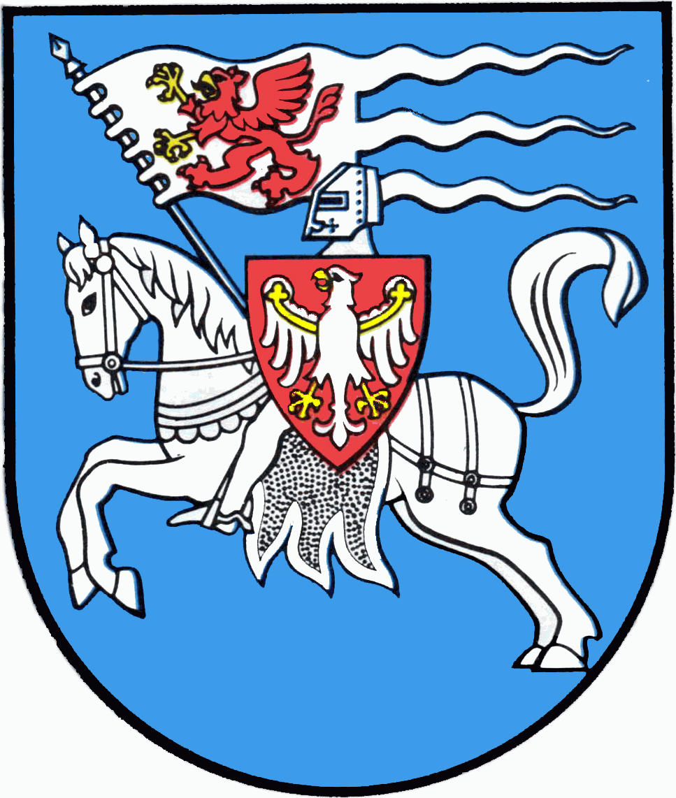 Herb Koszalina rysunku Eugeniusza Chudzika